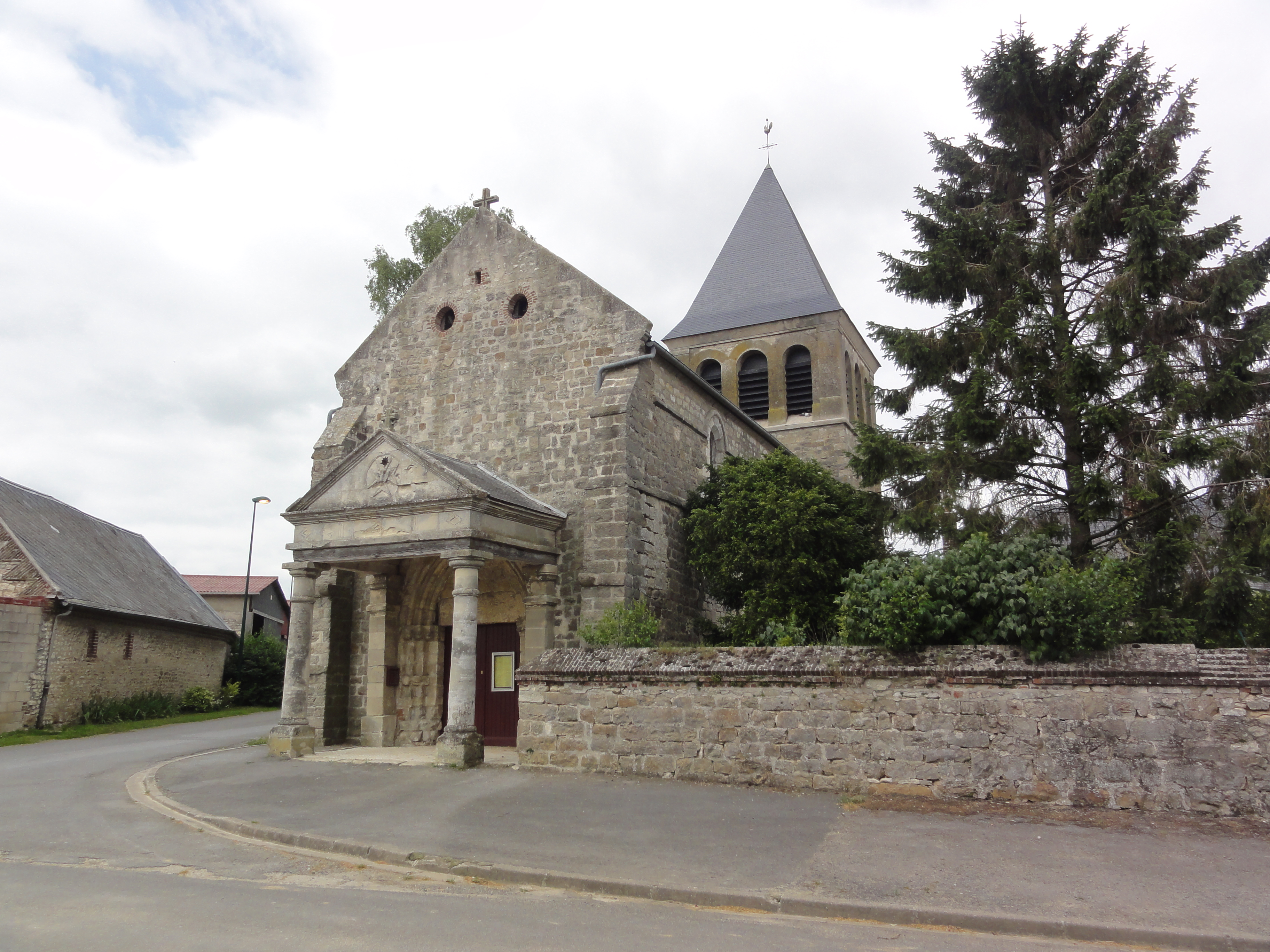 Grandlup-et-Fay (Aisne) église